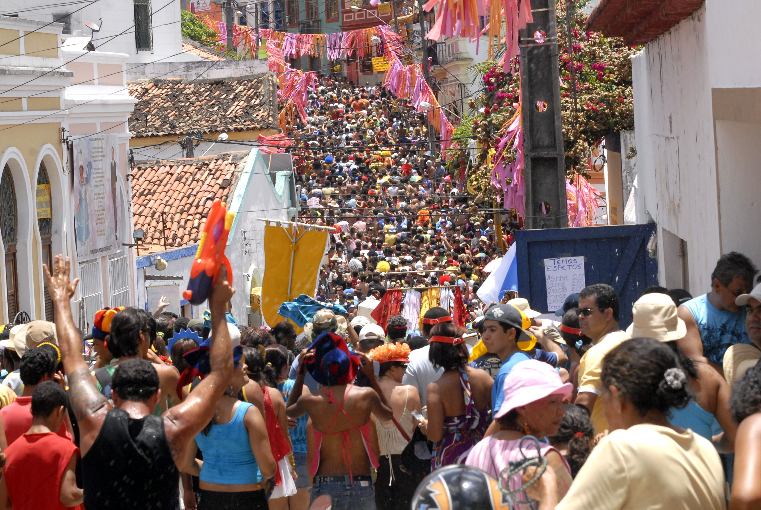 Carnaval de Olinda, Pernambuco, Brazil